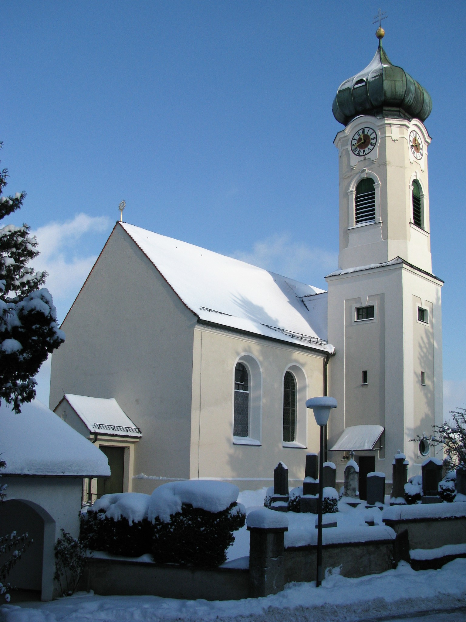 Kath. Filialkirche St. Ulrich in Wangen bei Starnberg; barocke Saalkirche von Georg Lettner, 1736, barockisierender Kirchturm mit Haube von 1908